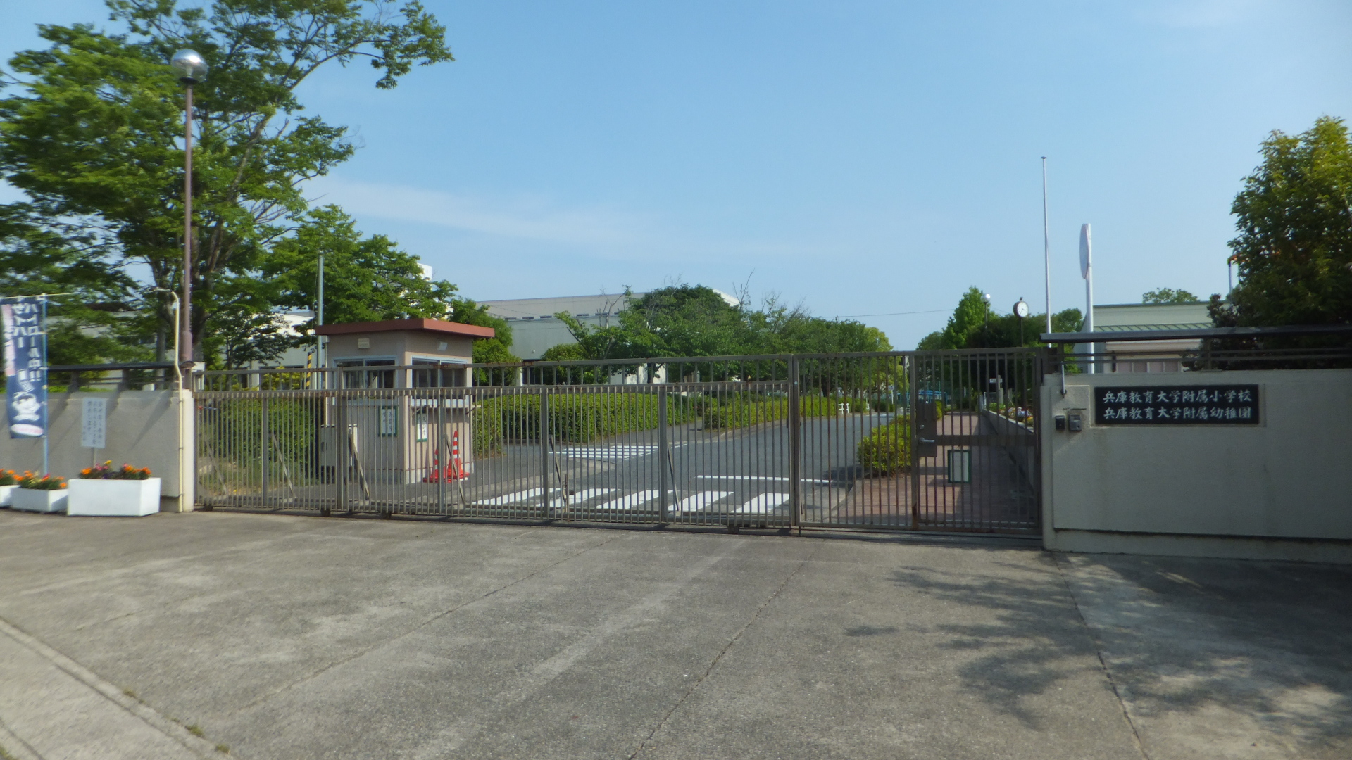 兵庫教育大学付属小学校